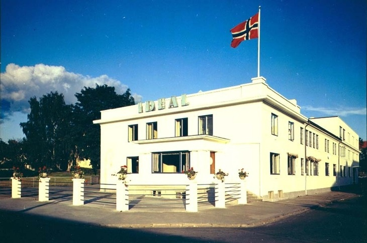 Fotografi av Ideal flatbrødfabrikk i Vangsvegen 51 på Hamar. Arkitekt: Fredrik Pettersen (1932). Revet 1993.